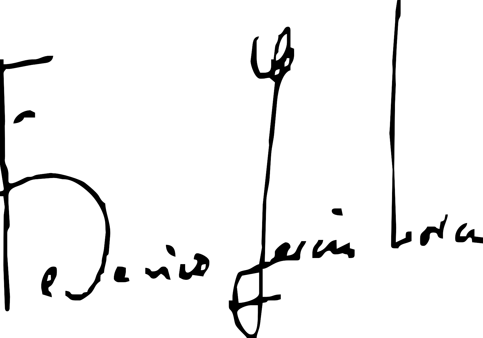 Firma de Federico García Lorca.